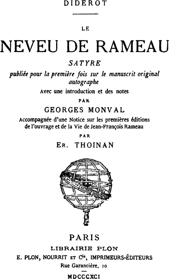 Le Neveu de Rameau (1841) by Denis Diderot (1713-1784)